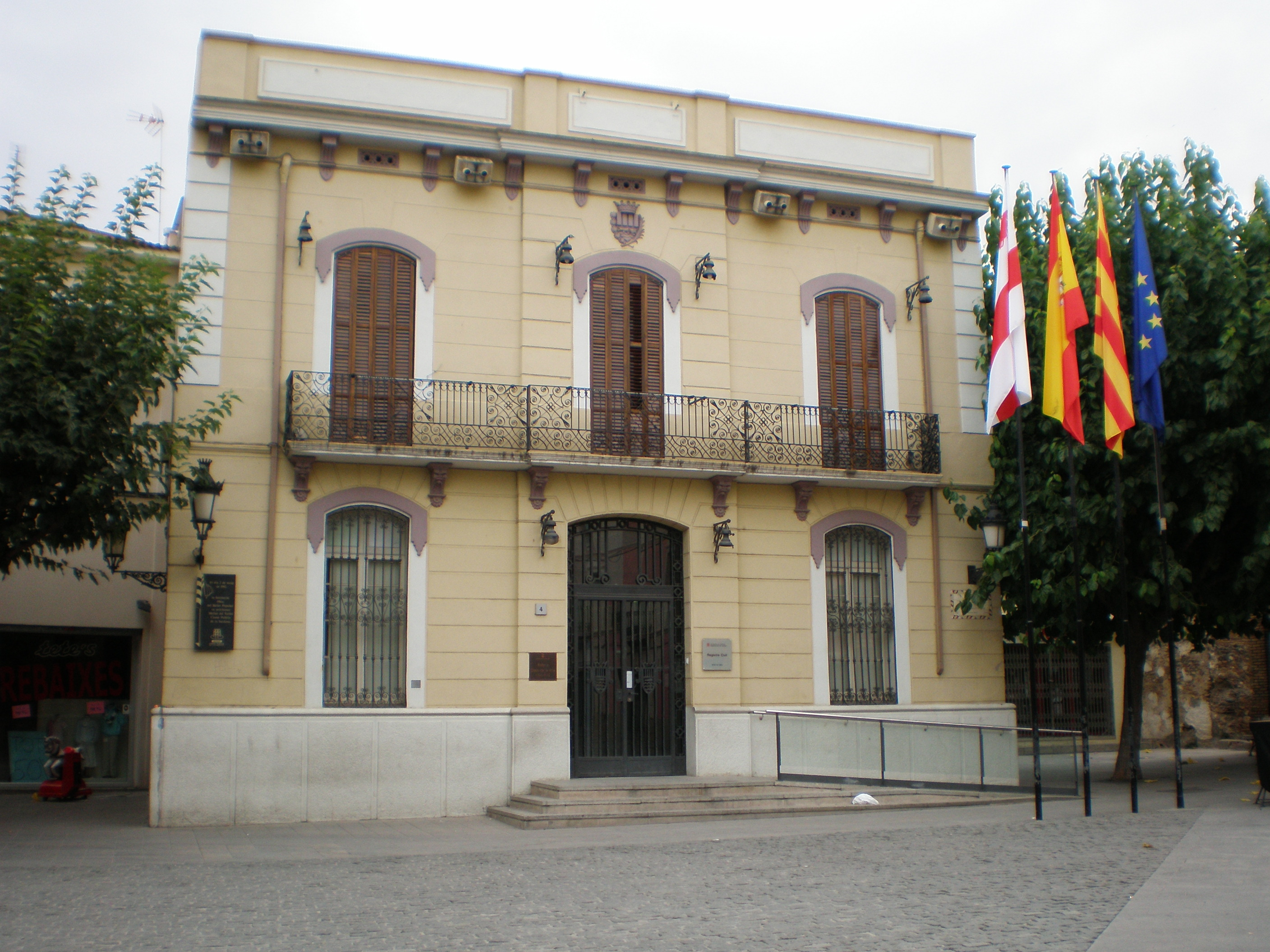 Antiga Casa de la Vila de Mollet del Vallès.